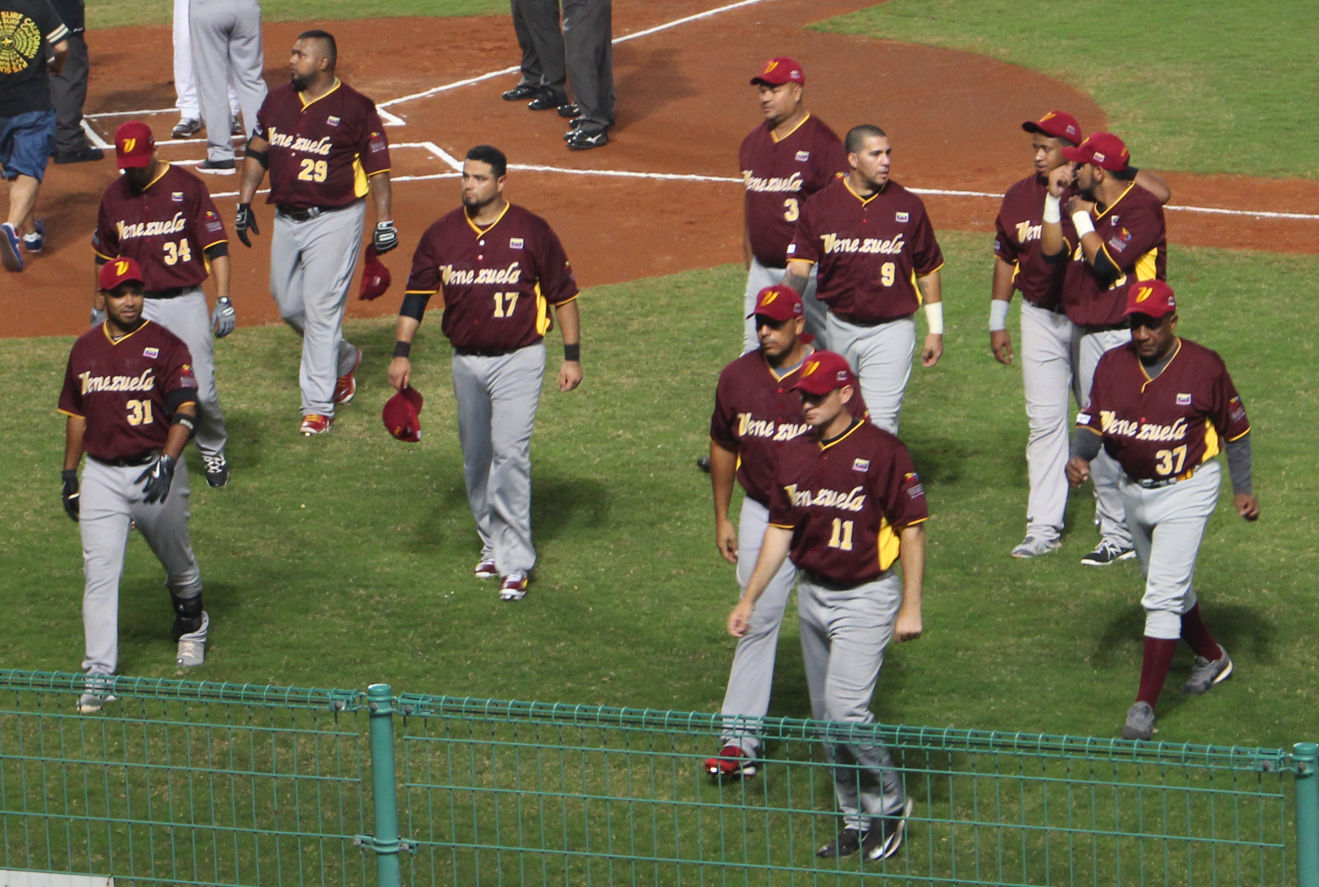 Venezuela national baseball team